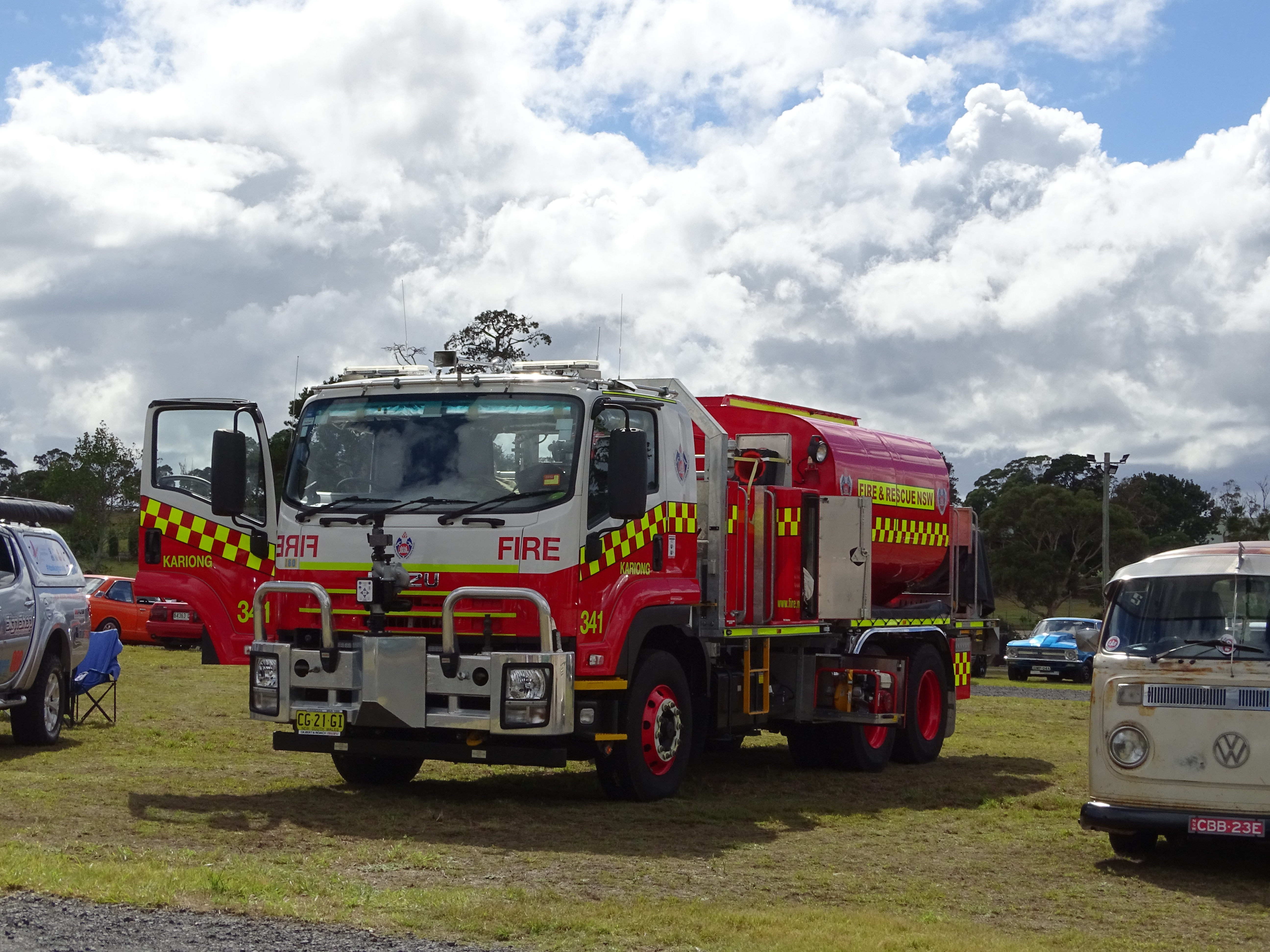 Isuzu FVZ 1400 Fire Fighting Plant